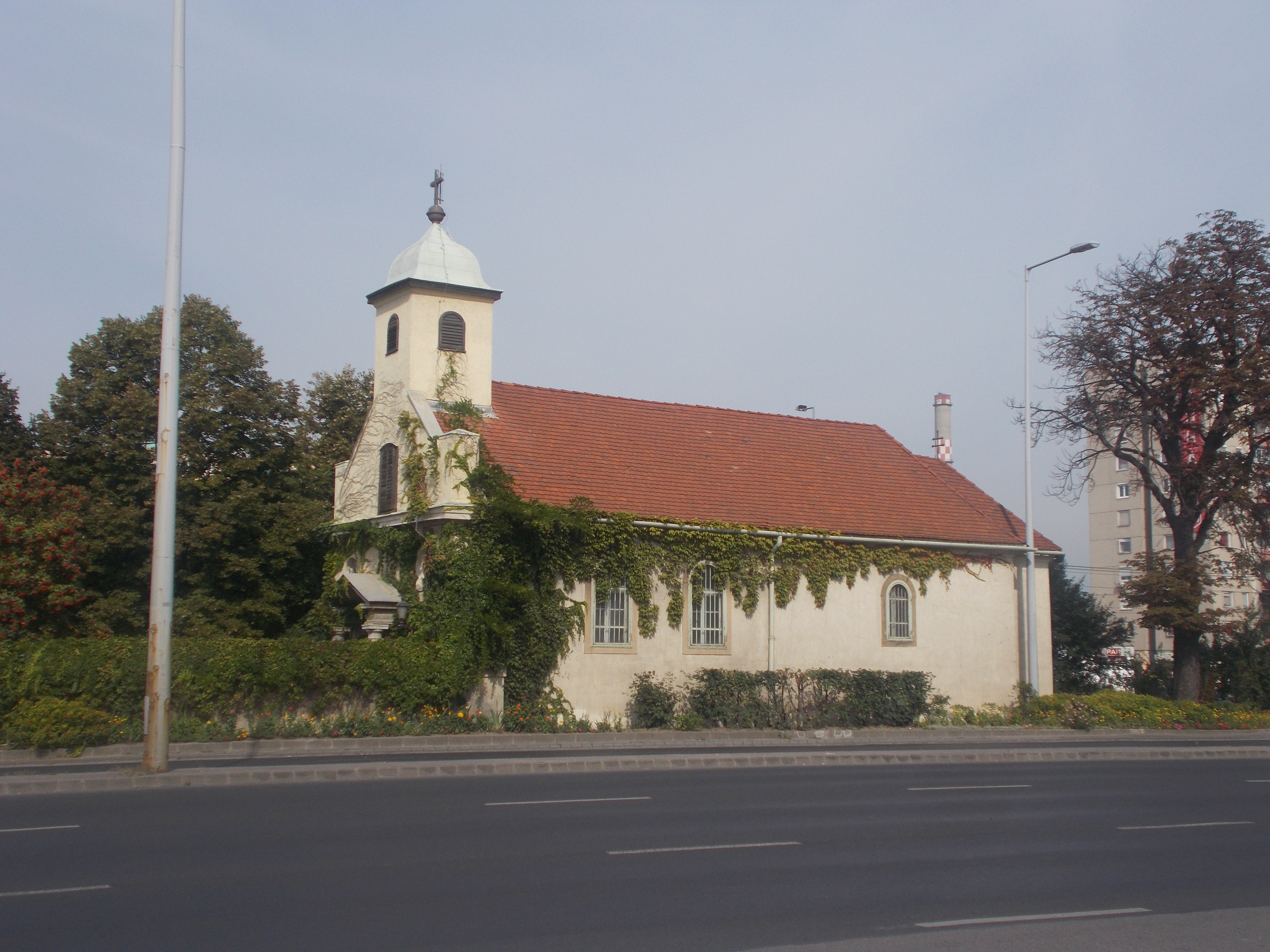 A katásdűlői volt fogadalmi kápolna, most Kövi Szűz Mária-plébániatemplom